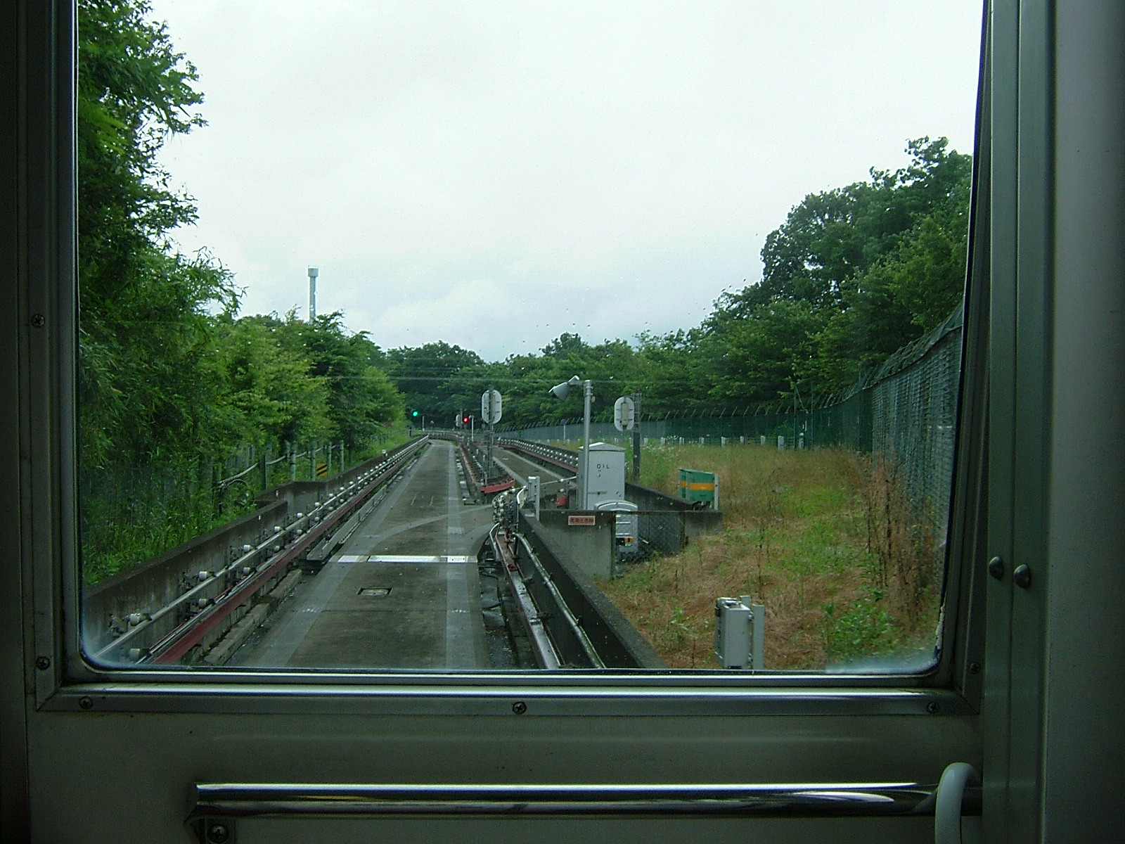 車内から撮影しました．